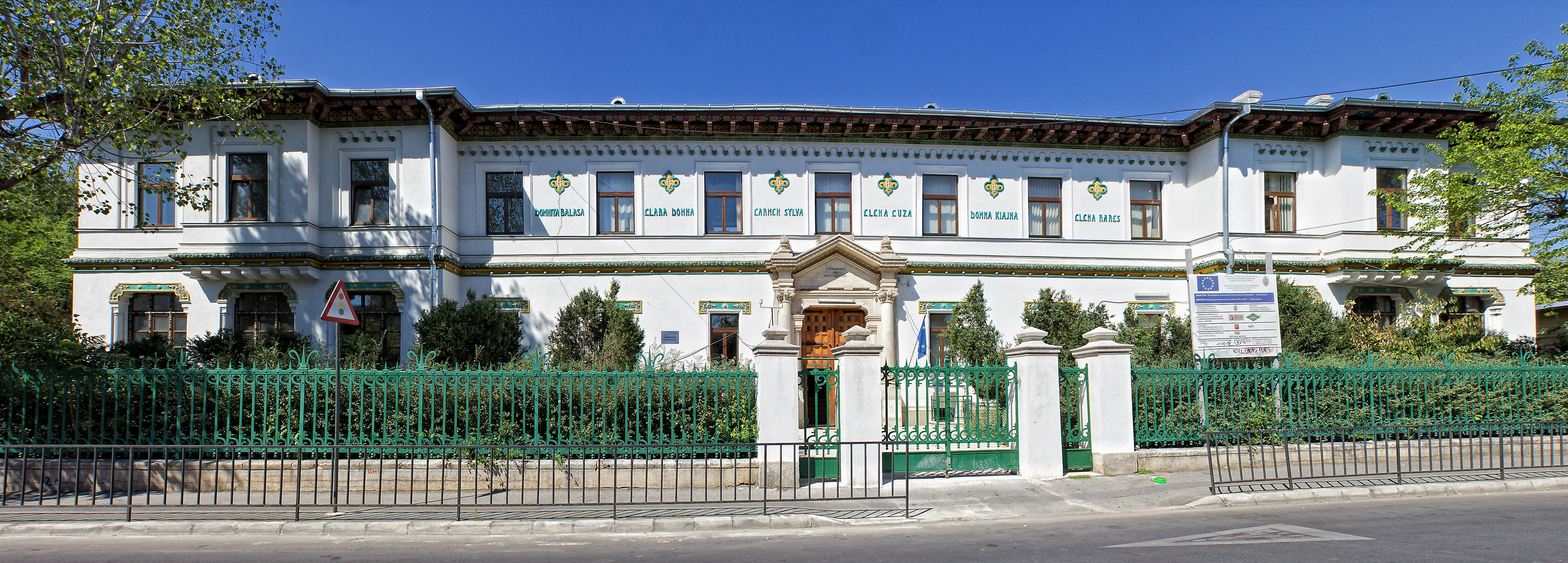 Scoala Centrala de Fete